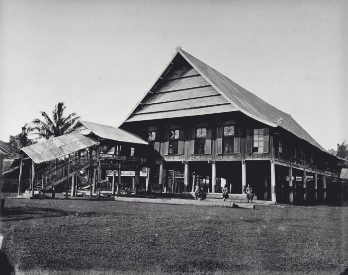 Foto. In het rijk Makassar waren de vorsten van Goa (ook wel gespeld als Gowa) en Tallo samengegaan, waarmee Makassar tot 1667 de machtigste staat was in de 'zuidwesterarm' van Celebes. In dat jaar sloten de Boeginezen van het vorstendom Bone een verdrag (van Bongaja) met de VOC tegen Makassar. Dit werd toen door het bondgenootschap verslagen en het fort Ujung Pandang (tot voor kort onder de Republiek Indonesië de naam voor Makassar) kwam in handen van de VOC en werd later omgedoopt tot Fort Rotterdam. Het paleis op de foto, typerend voor de Makassaarse bouwstijl, dateert van de 19e eeuw. Na de val van Makassar werd dit een belangrijke VOC vestiging, terwijl Bone de belangrijkste inheemse staat in het gebied werd. (P. Boomgaard, 2001). Paleis van de vorsten van Goa